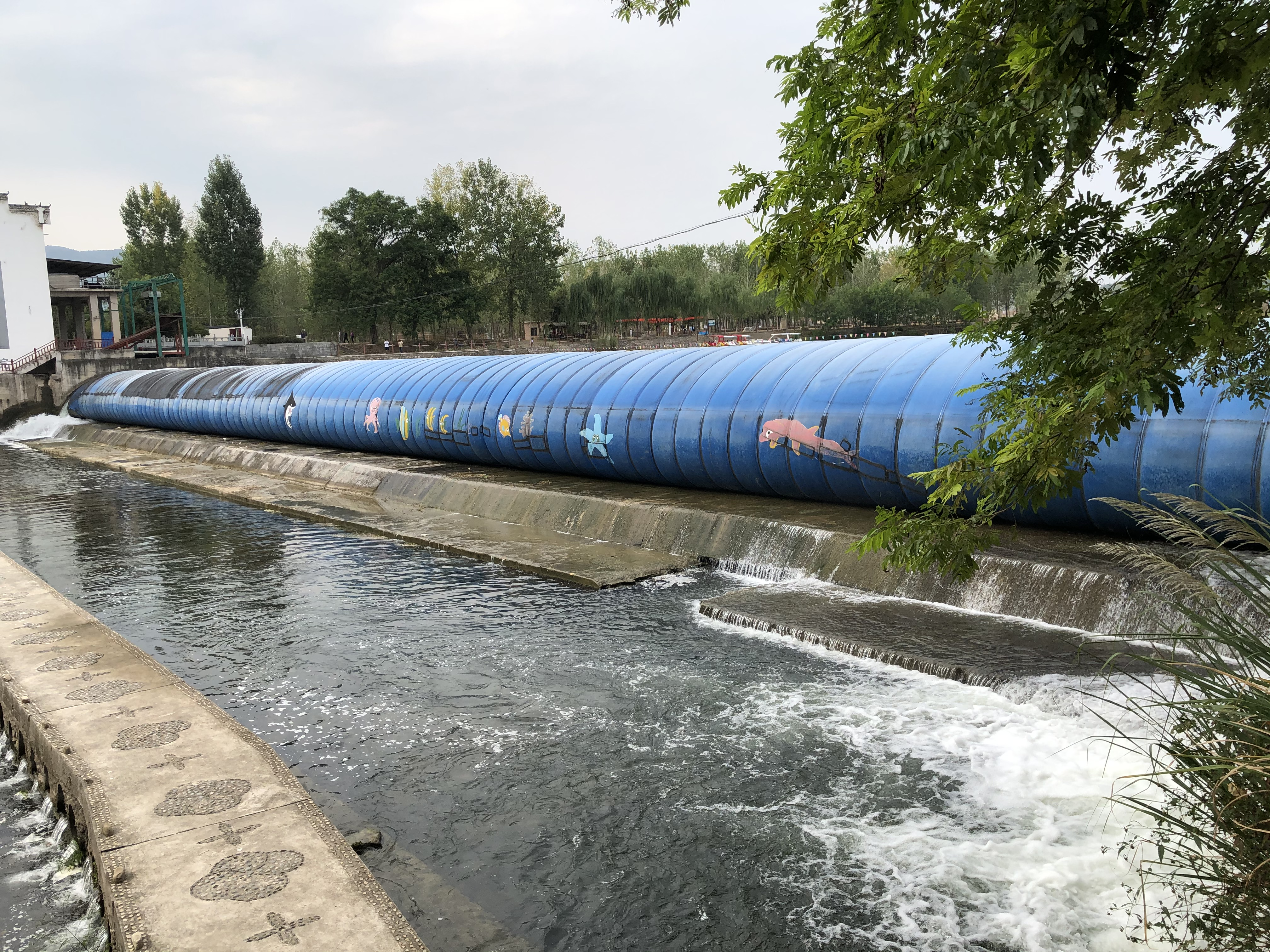 中文（中国大陆）: 位于湖北省宜昌市远安县的回龙湾景区